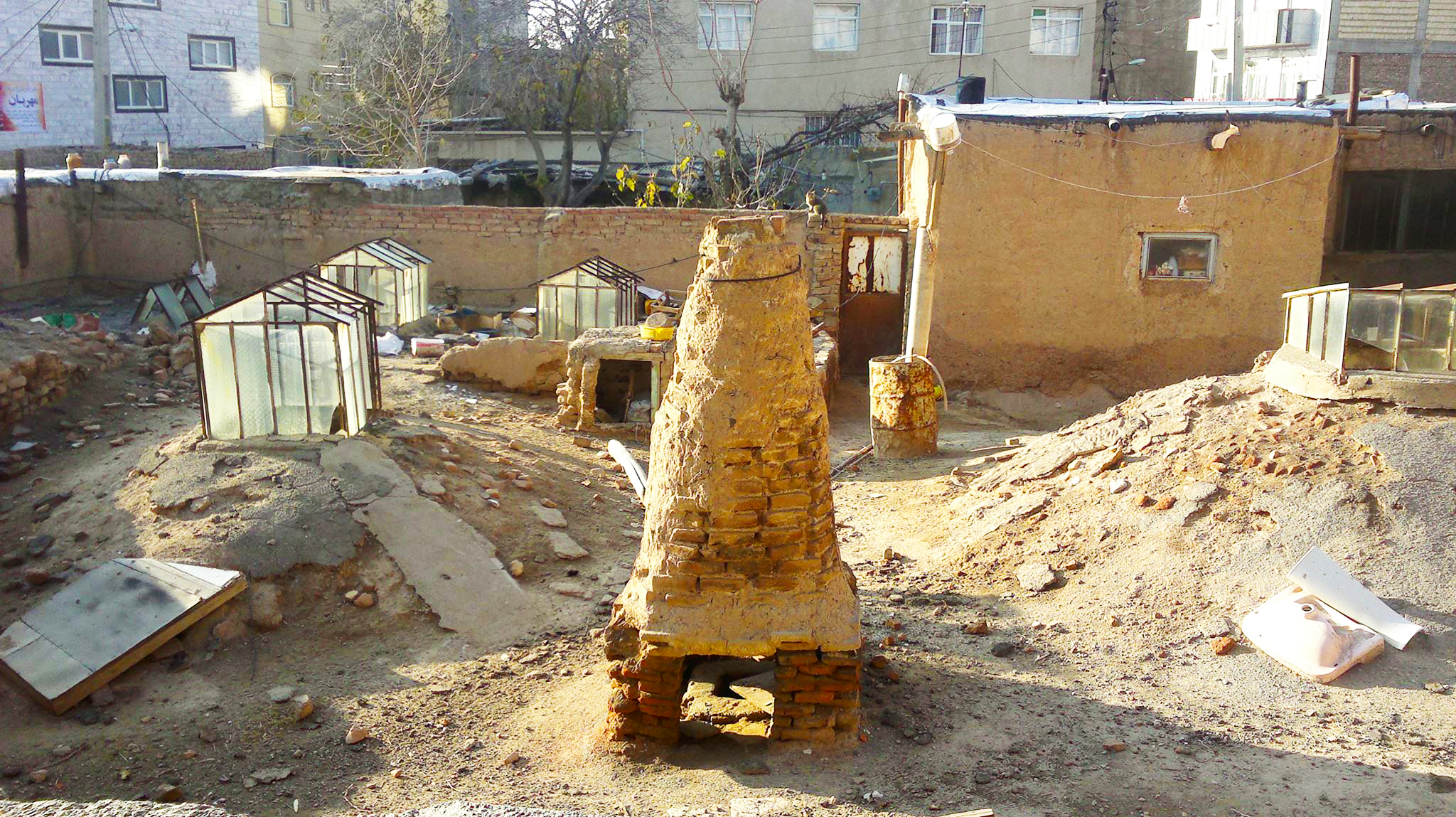 حمام تاریخی شنب غازان تبریز